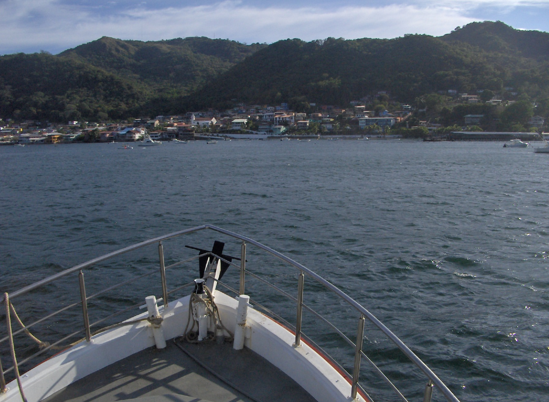 Isla de Taboga